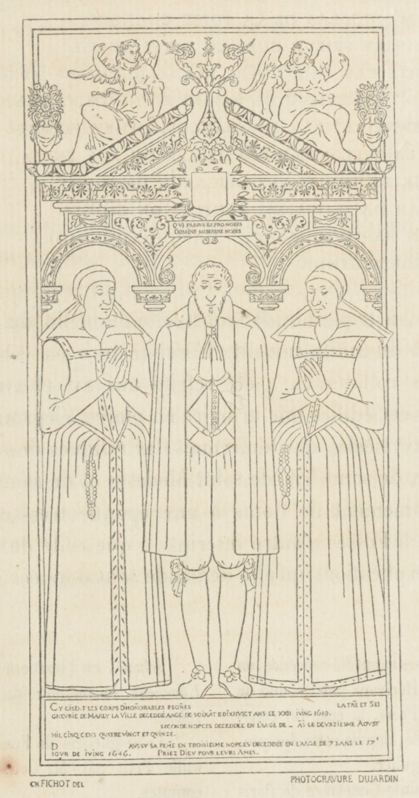 Dalle funéraire d'un seigneur et de ses deux épouses.